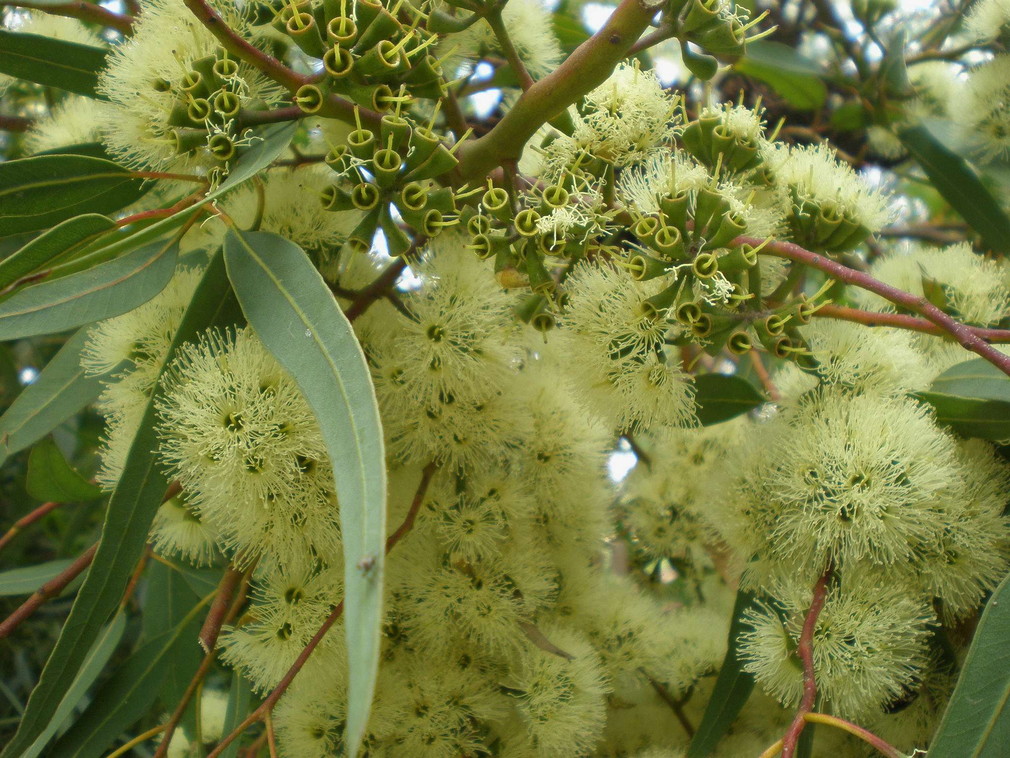 Jardín Botánico de Barcelona.